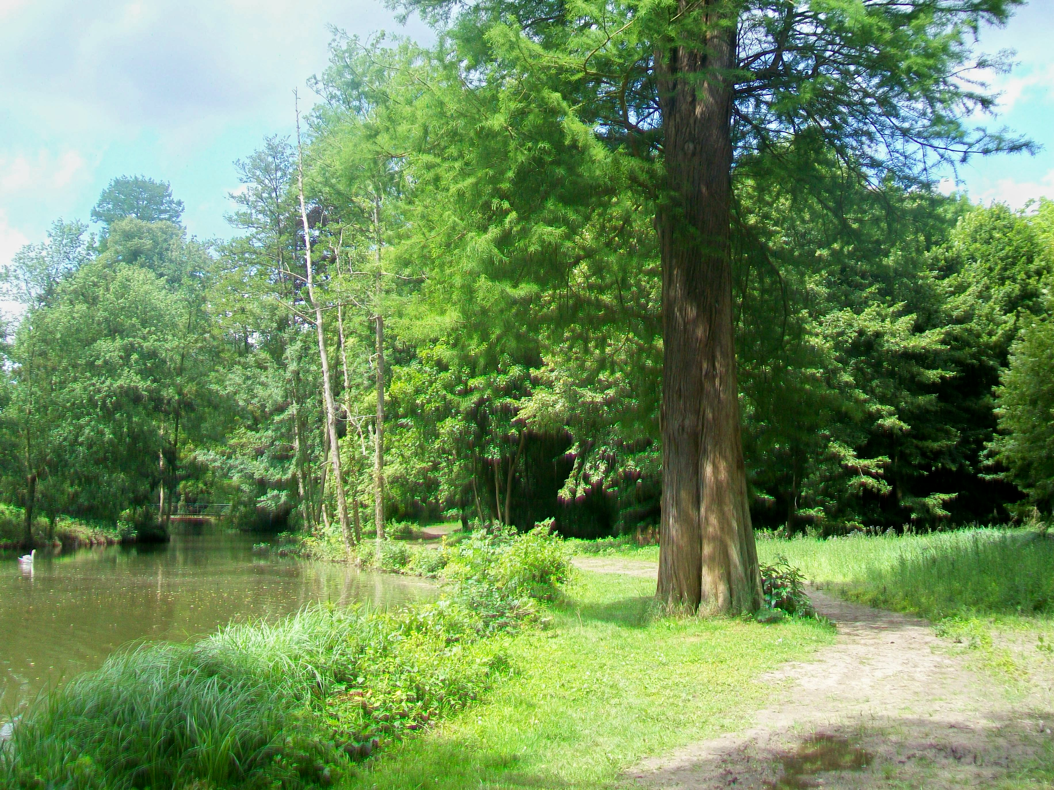 Chemin de promenade et rivière anglaise.